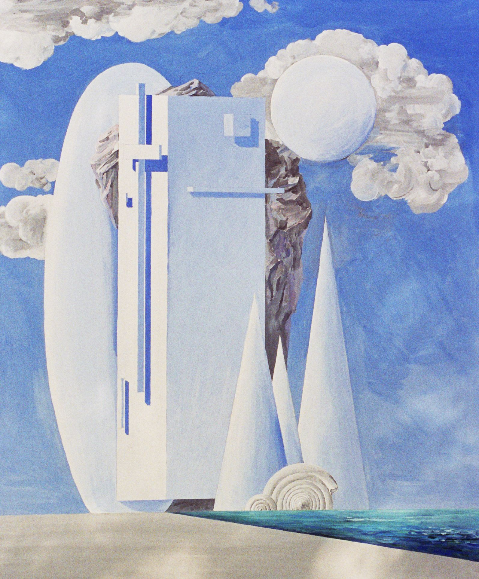 Орловский В. Ф. Композиция «Храм», 2006 г. Холст, темпера, 120х100см.